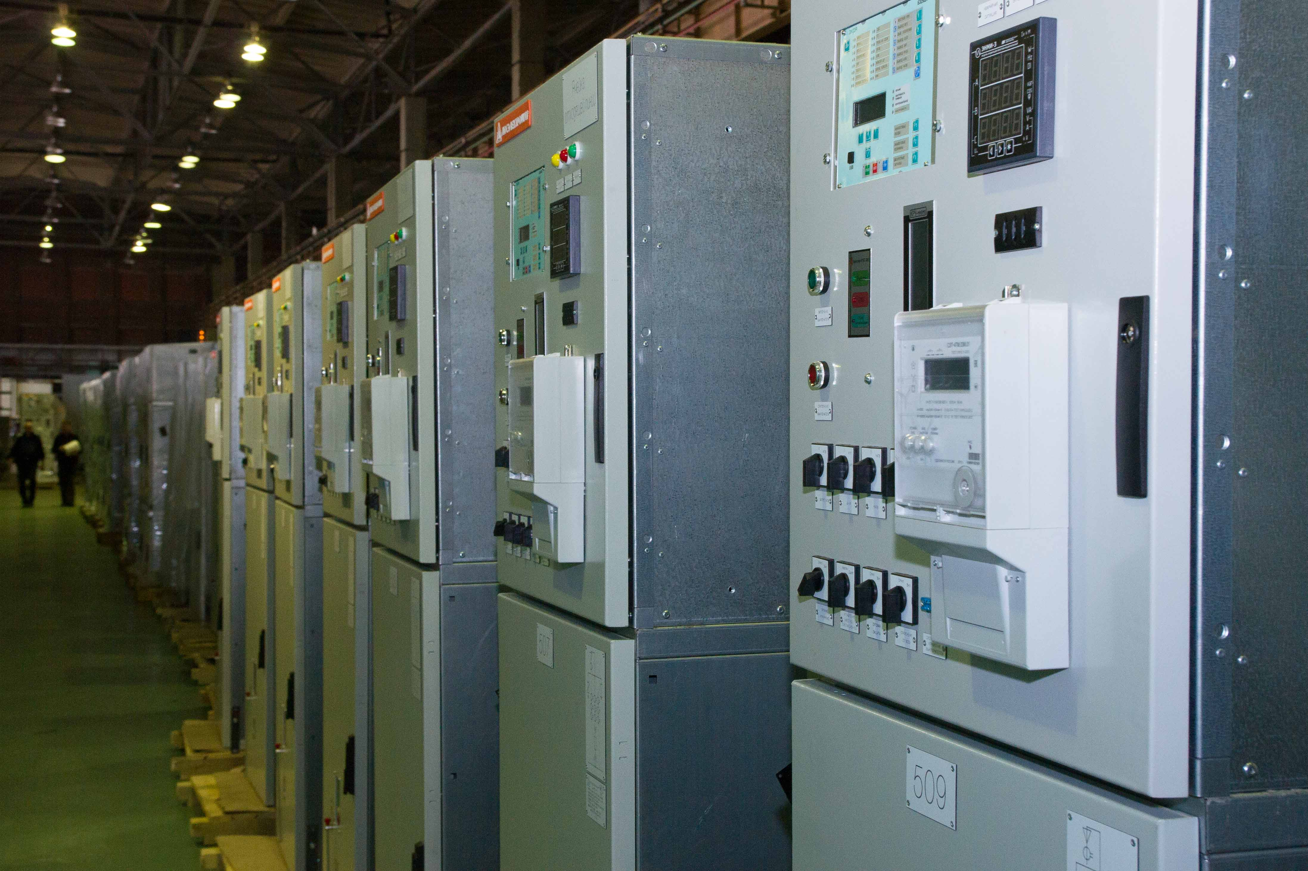 К-128 КЛАССИК на 6(10) кВ